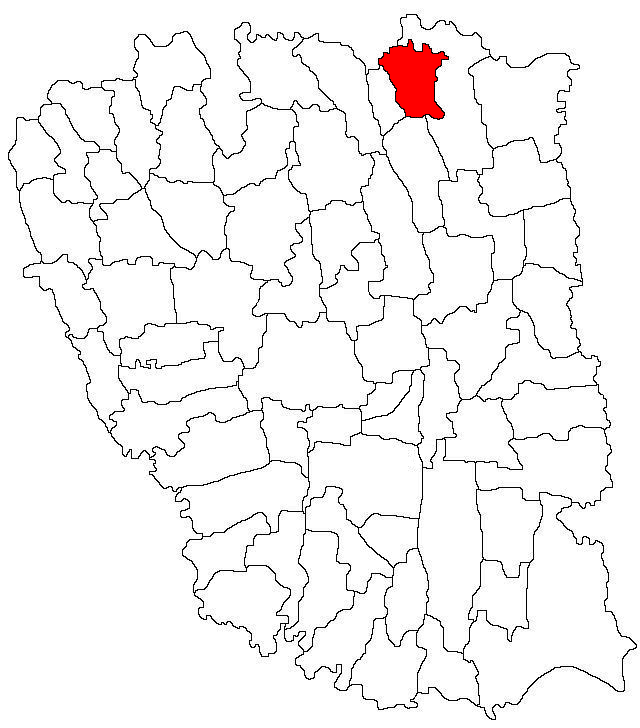 Categorie:Hărţi ale judeţului Galaţi